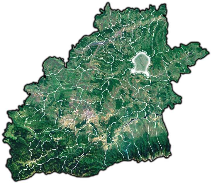 Barghis jud Sibiu.